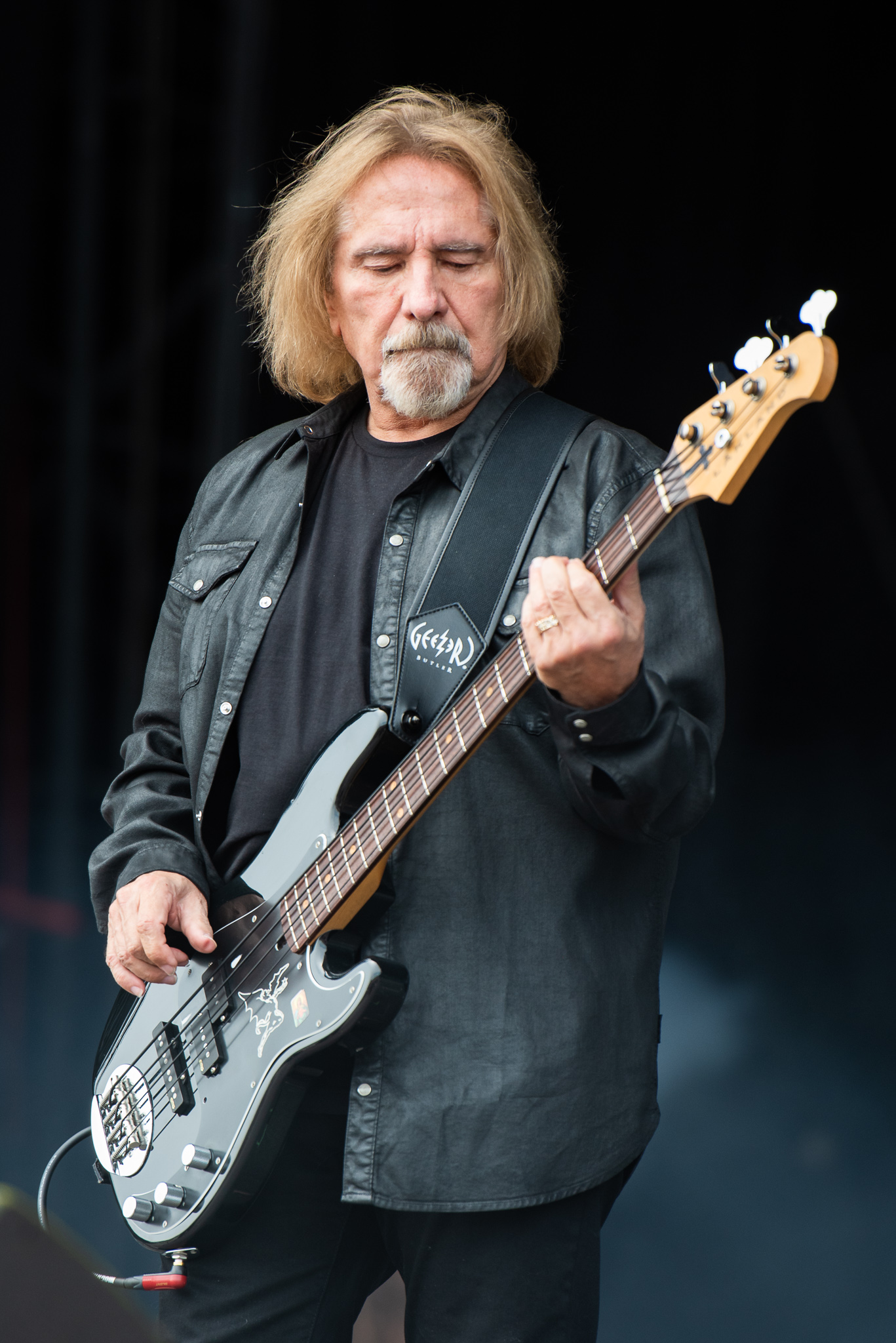 ARGO-Konzerte,Deadland Ritual,Geezer Butler,Konzert,Livekonzert,Livemusik,Musik,RiP,Rock im Park 2019,Zeppelin Stage